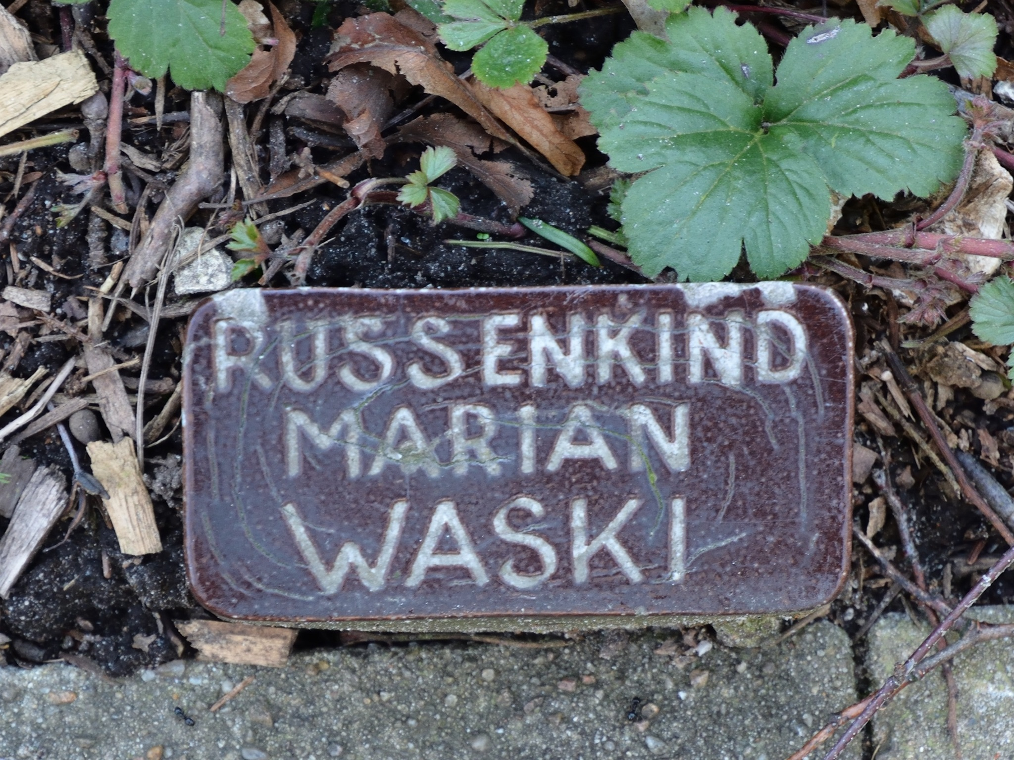 Bilder vom Nordfriedhof Neumünster. Kindergrab aus dem Zweiten Weltkrieg